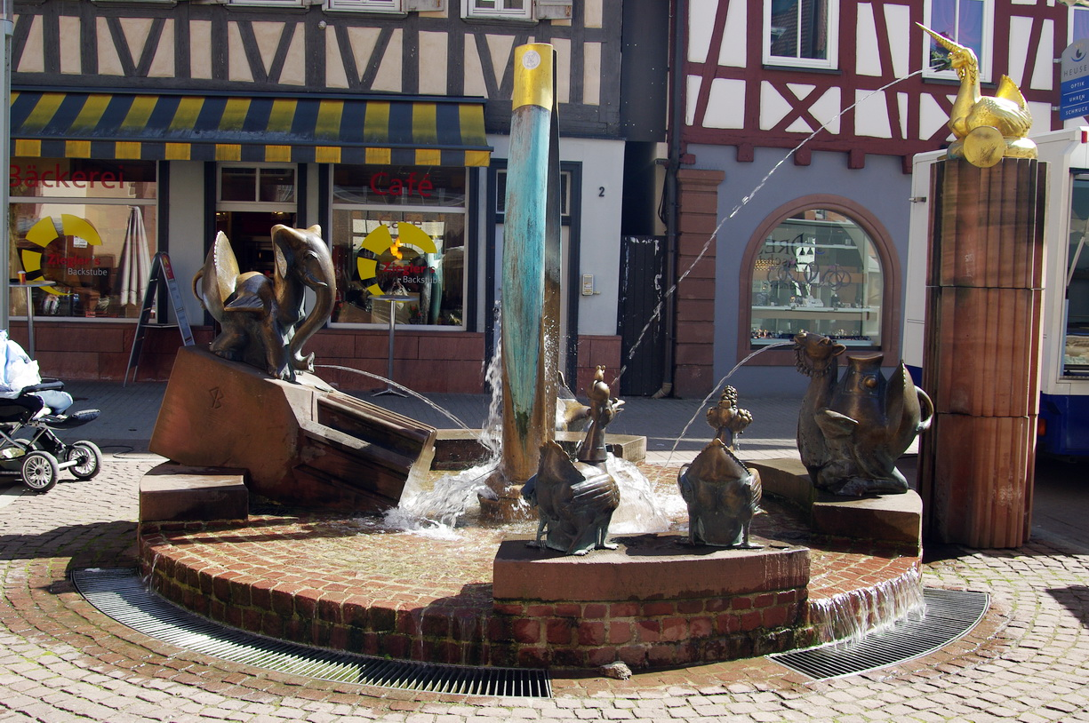 Brunnen am Marktplatz, Nagold